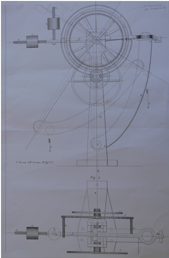 Goniobarímetro según diseño original de Darío Bacas Montero con mecanismo de acumulación de pesadas